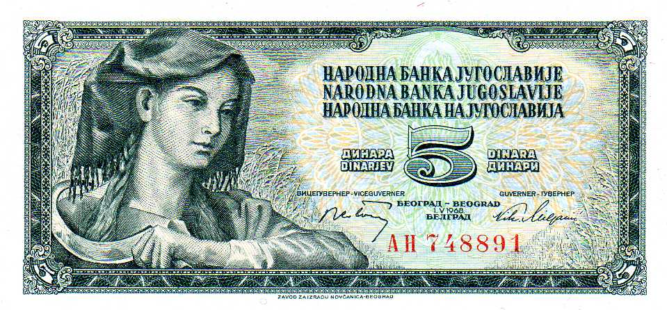 5 Yugoslav dinar (1968) - obverse